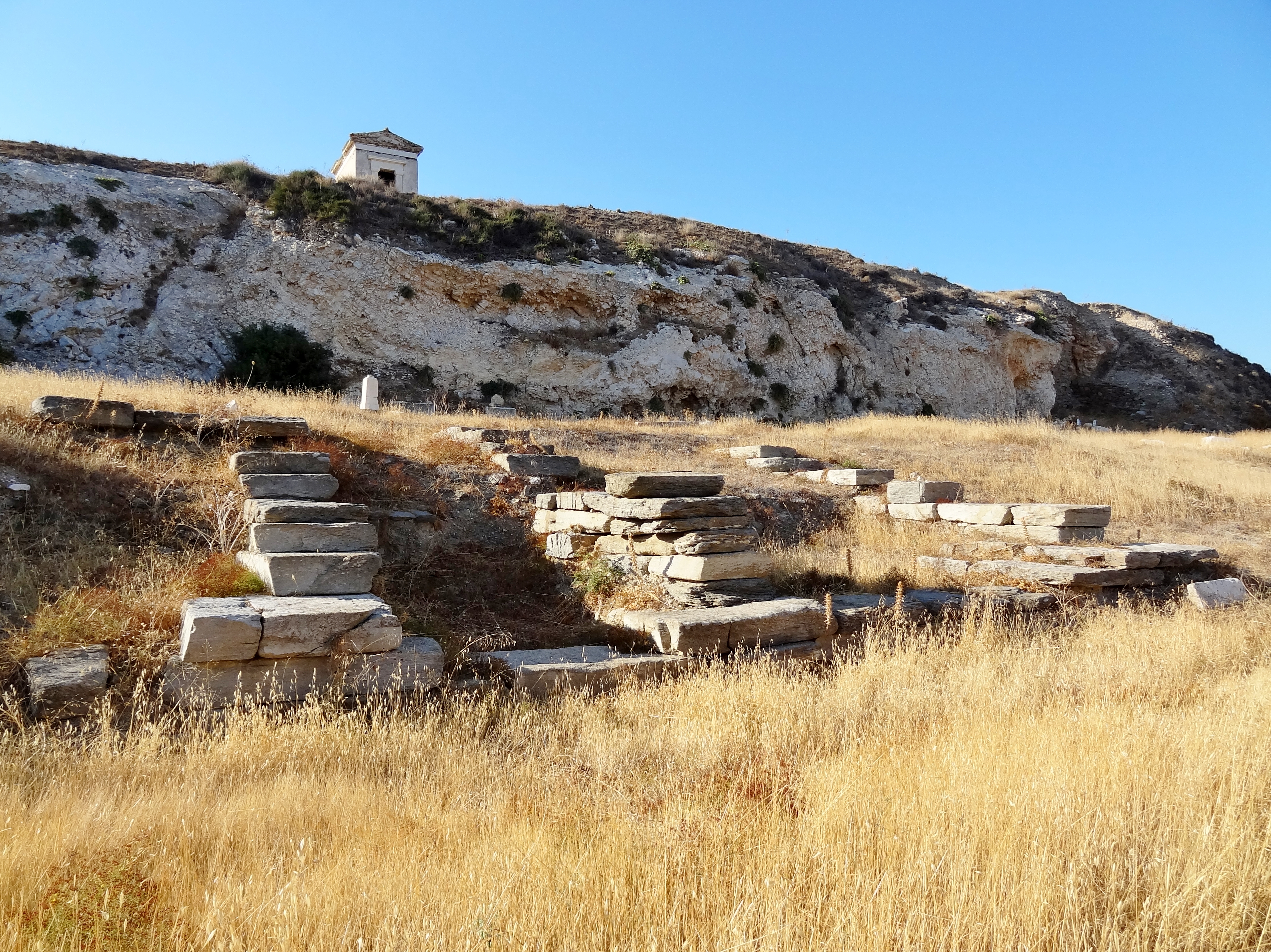 Asklepieion in Parikia auf Paros, Kykladen, Griechenland